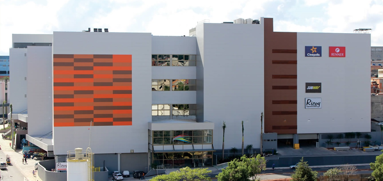 Fotografia do Shopping de Carapicuíba tirado em Frente a Estrada Ernestina Viera no bairro Vila Silviana.